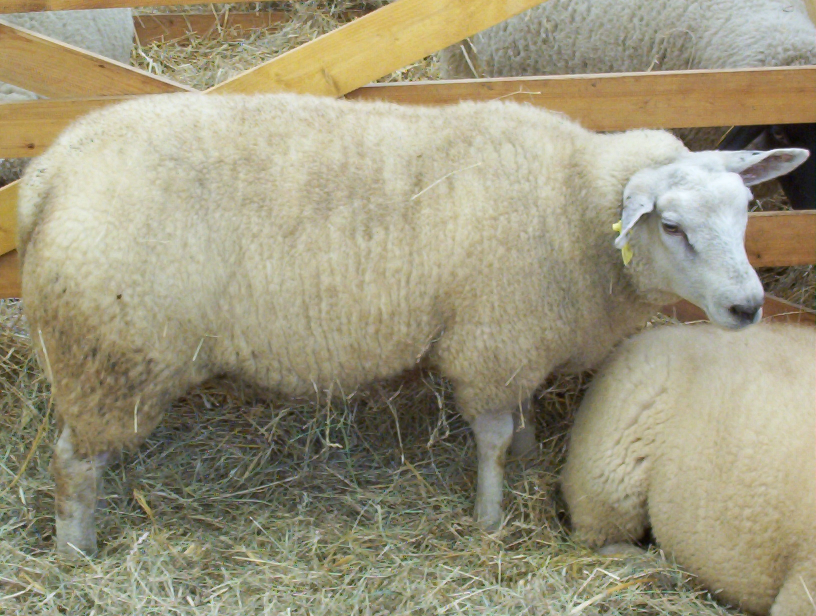 Texel juh